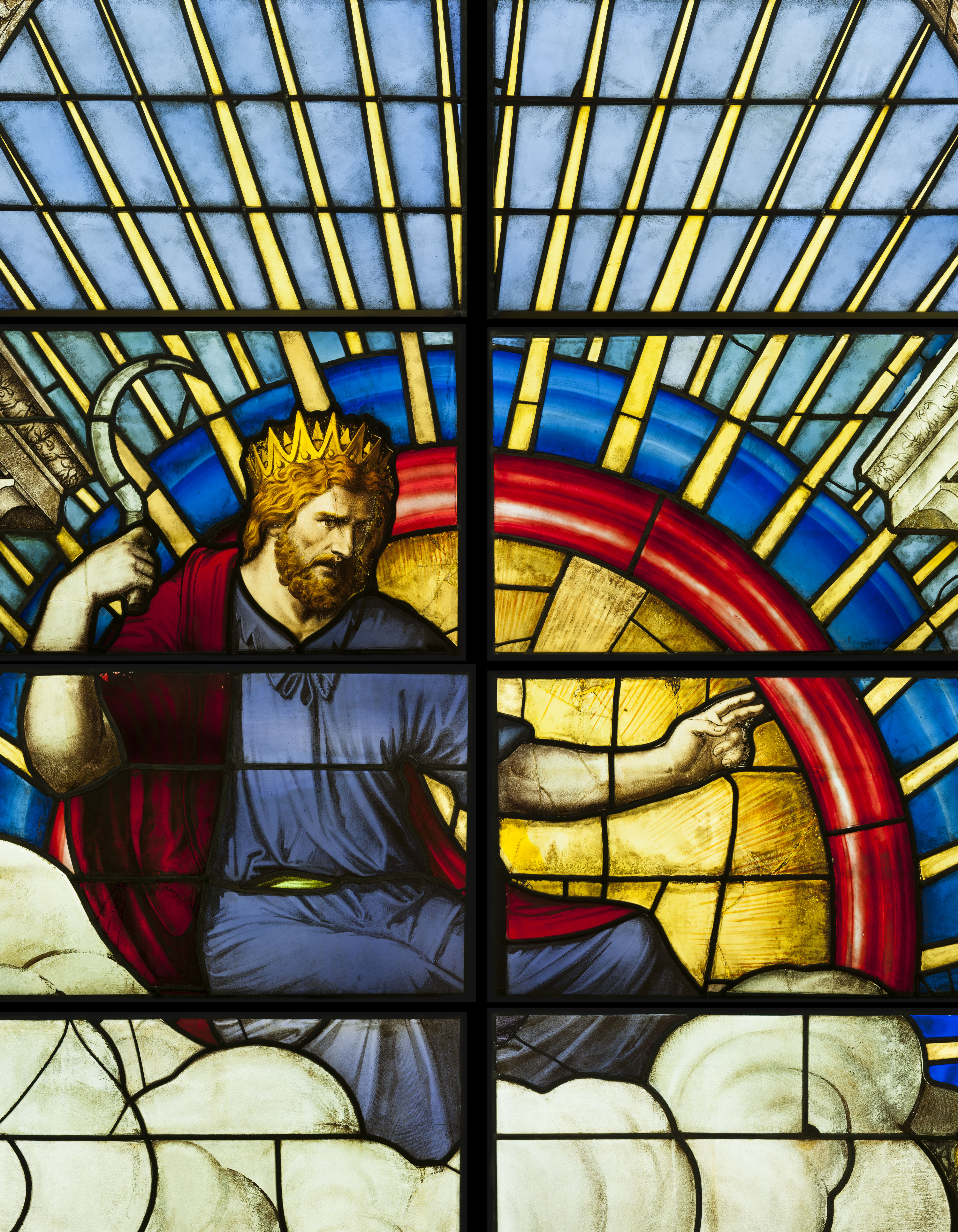 Montage présentant un détail du registre supérieur de la baie 6 du choeur.